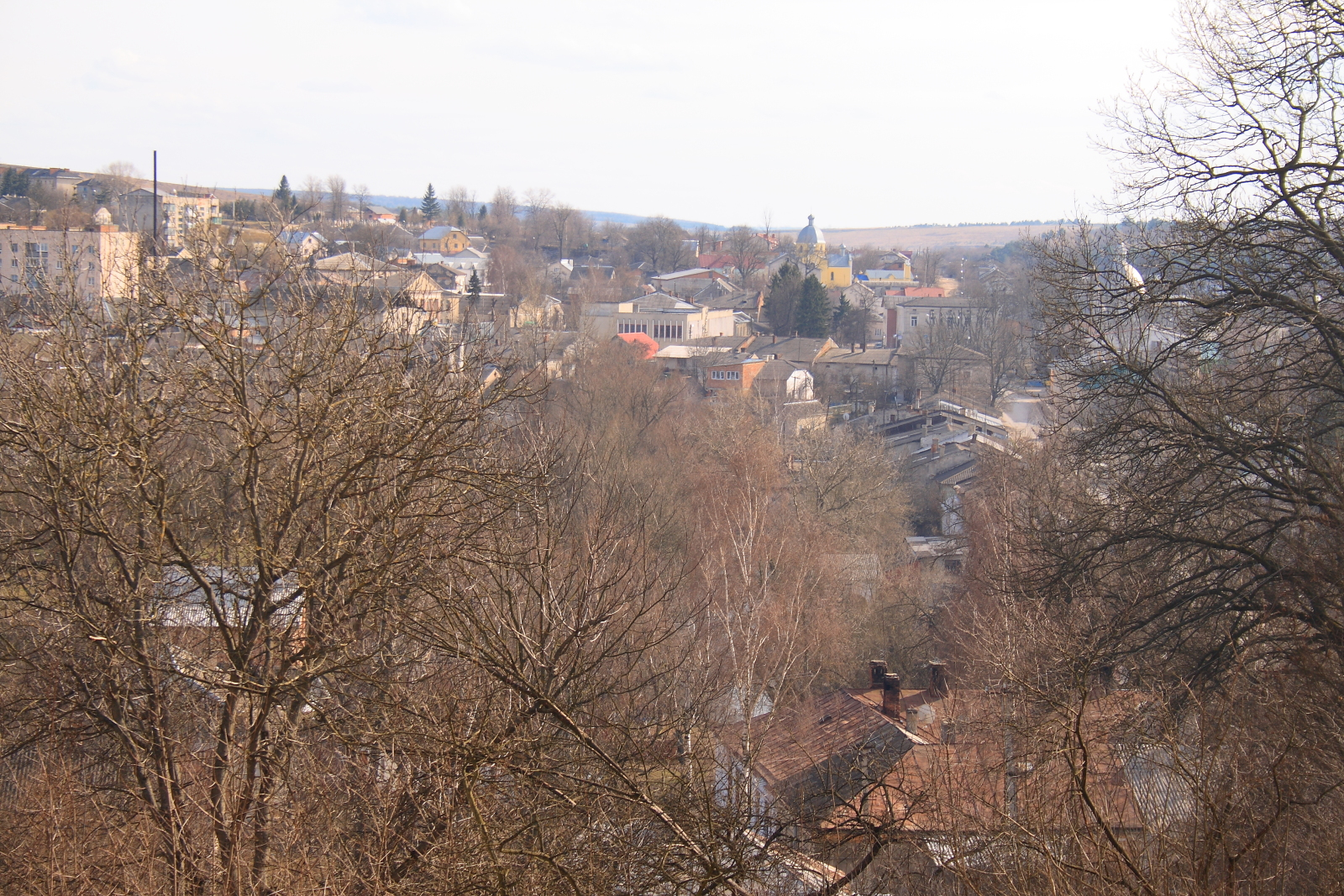 Микулинці